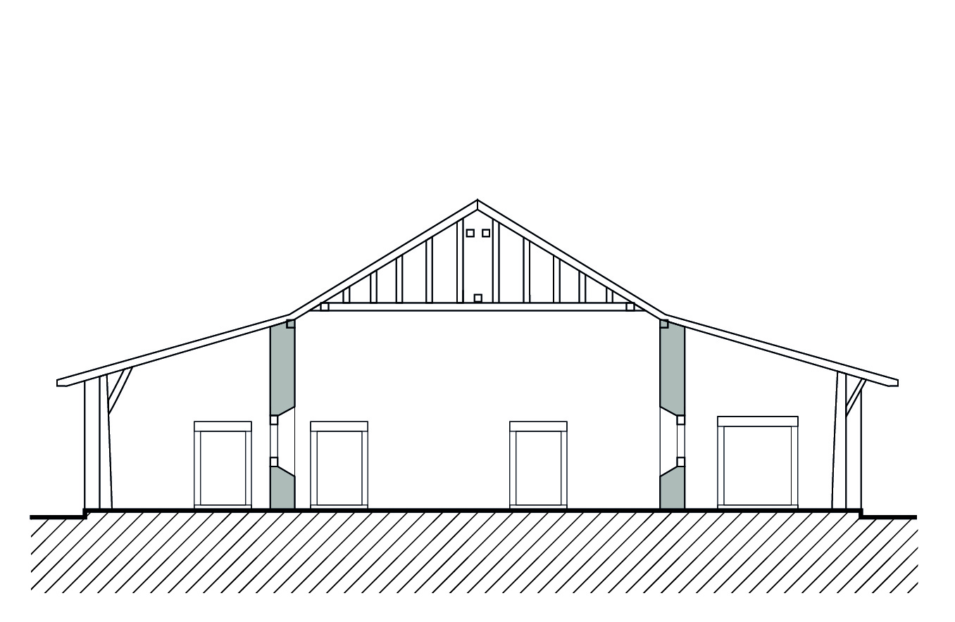 Sítio do Mandu - Corte